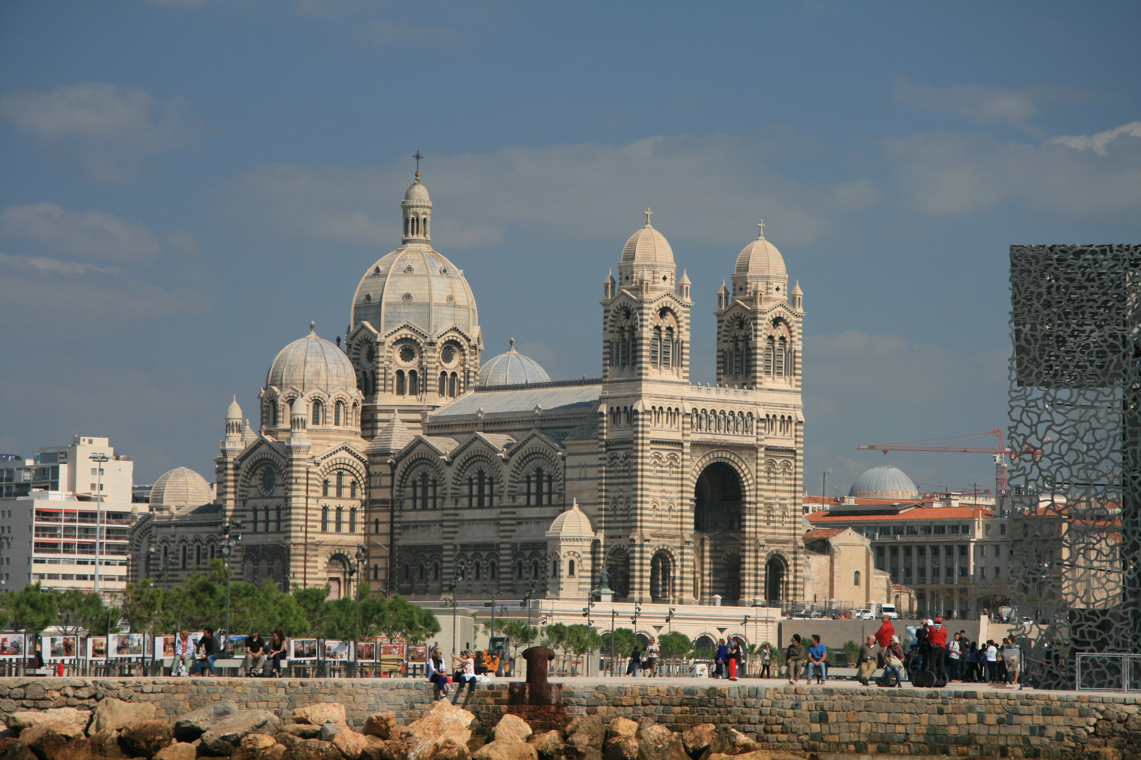 Кафедральный собор Марселя.